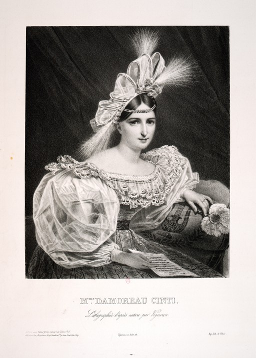 Laure Cinti-Damoreau, lithographie d'après Vigneron (c. 1830)